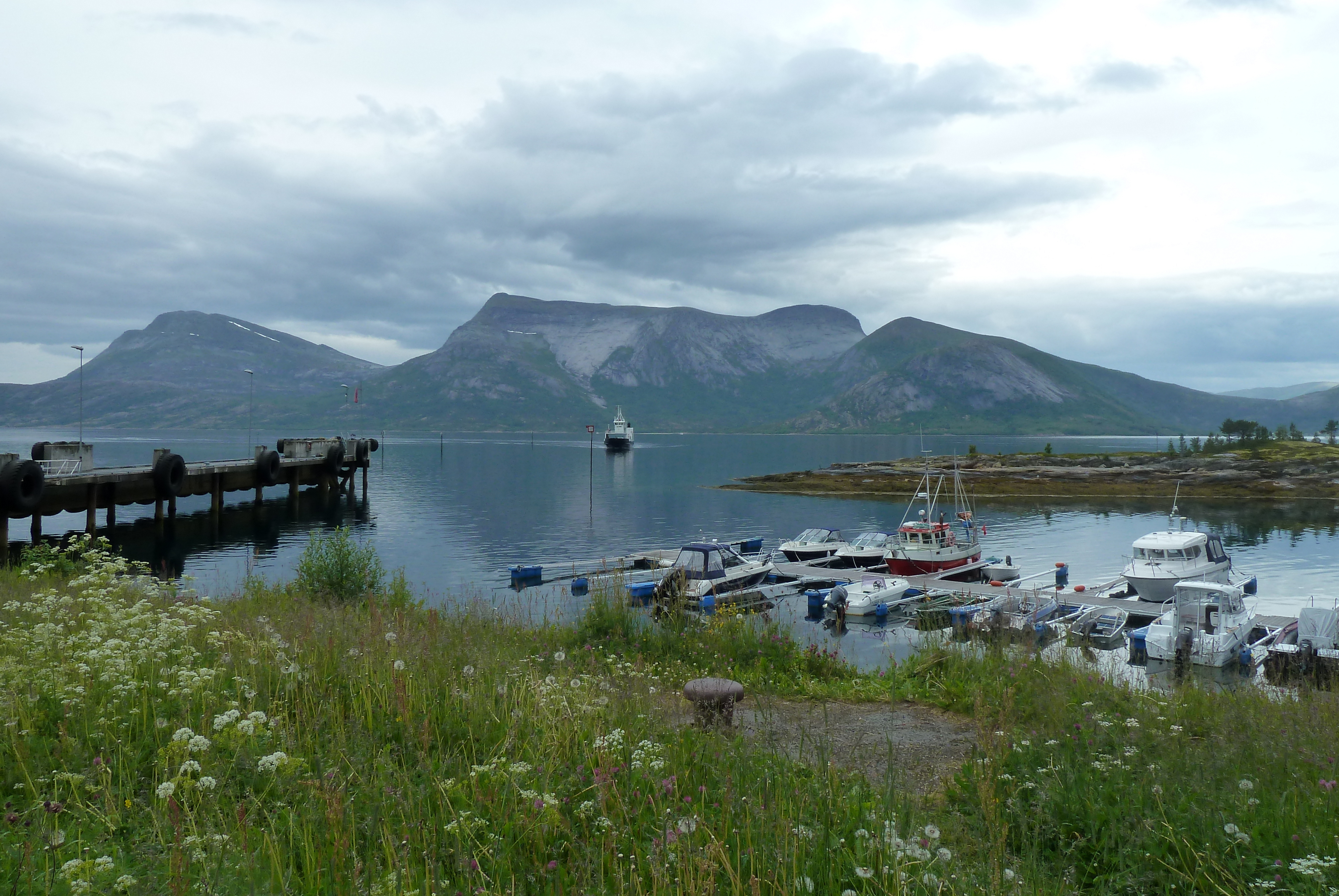 MF Godfjord på vei inn til kai på fergestedet Skarberget i Tysfjord.